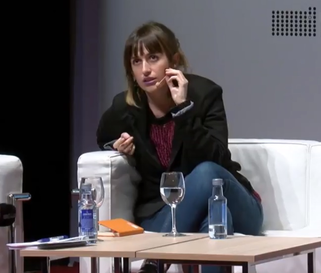 Anita Botwin es periodista y guionista de series y programas de televisión. Actualmente escribe sobre diversidad funcional, feminismo y sexualidad.